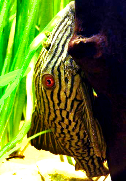 Panaque sp., most probably Panaque nigrolineatus L.027b "Olive royal plec"